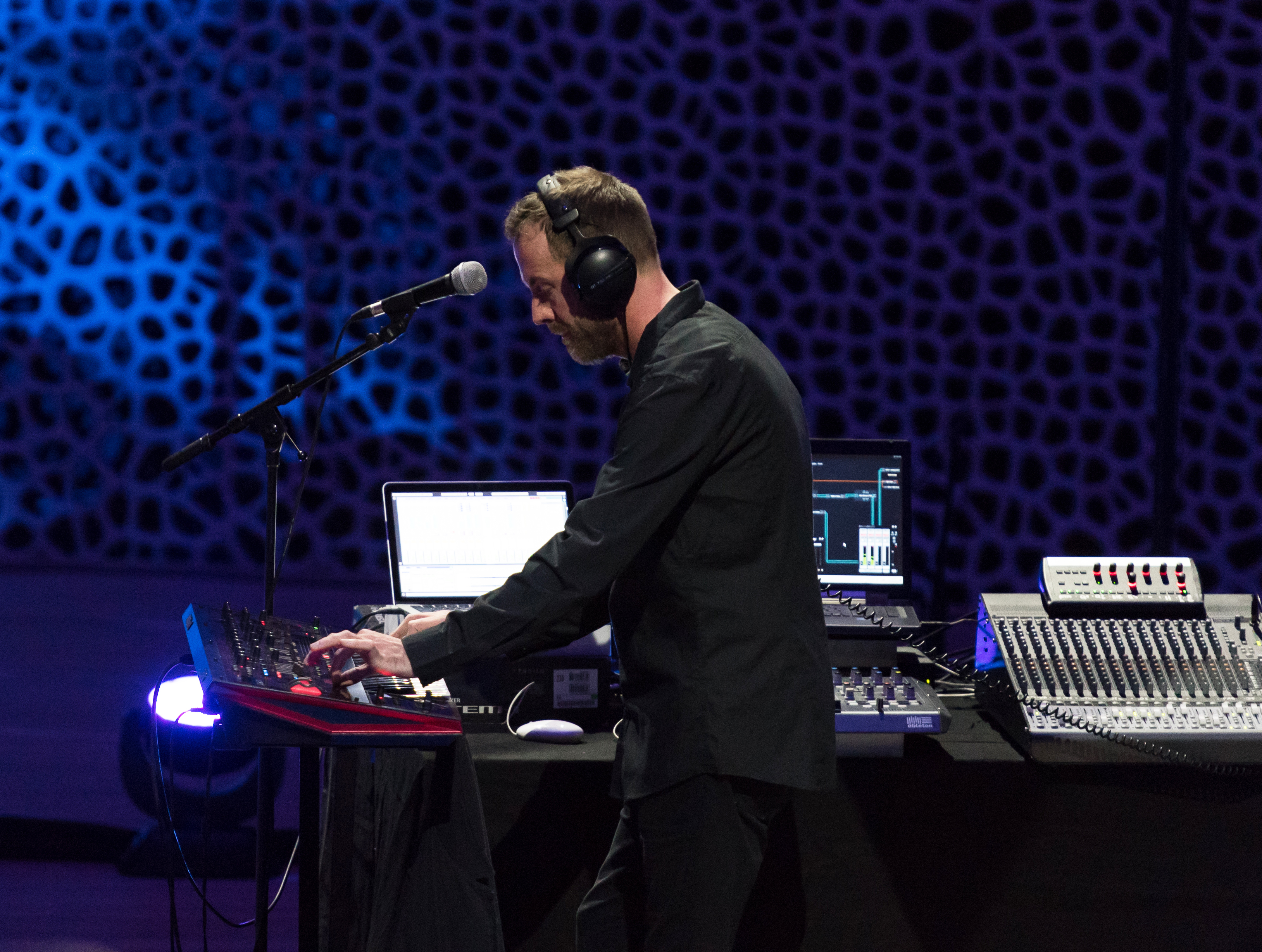 Tangerine Dream bei der Quantum of Electronic Evolution Tour in der Elbphilharmonie Hamburg 2018